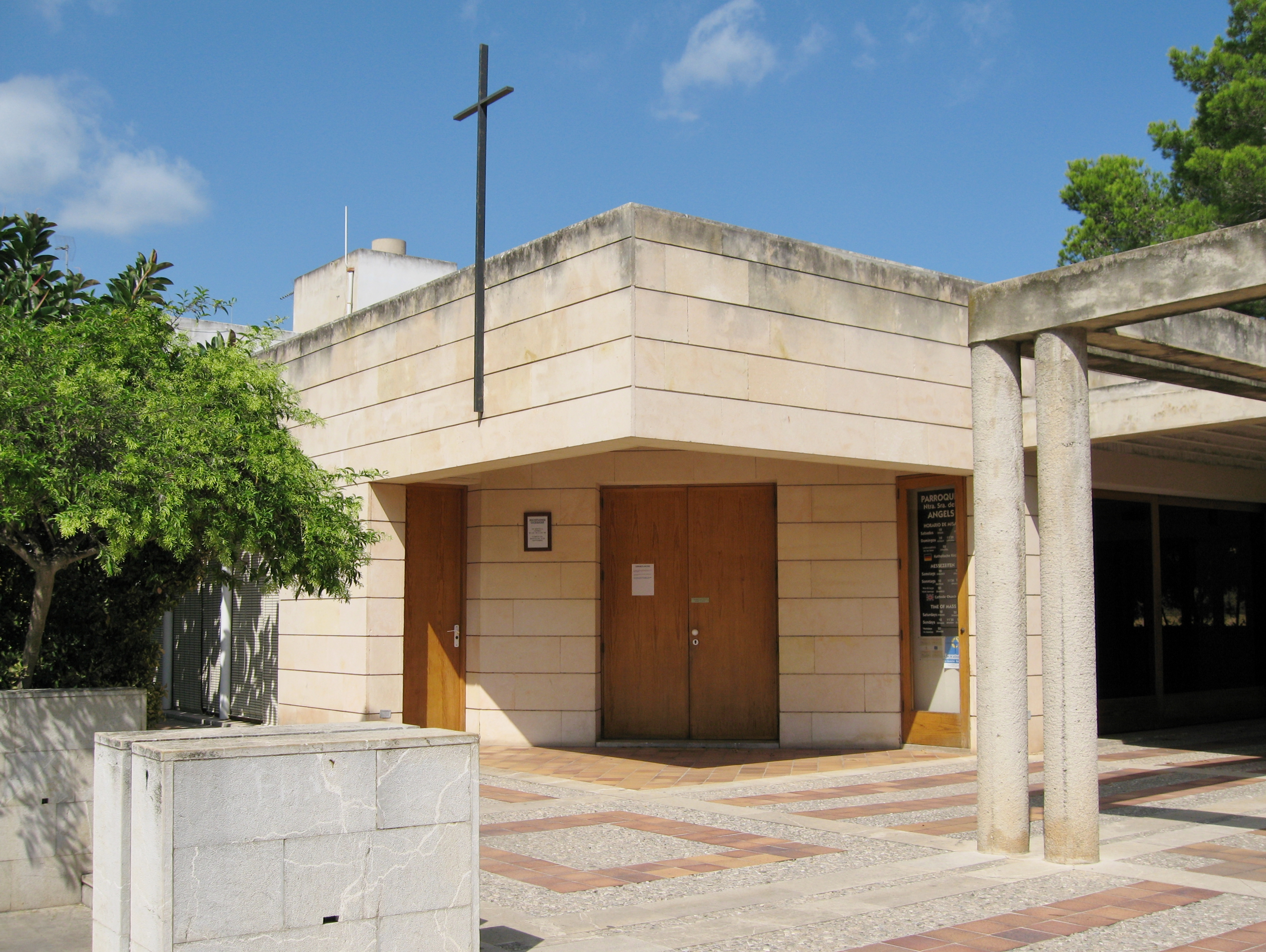 Church of Cala Millor (ca: Parròquia de Nostra Senyora dels Àngels, Cala Millor / de: Pfarrkirche von Cala Millor), Son Servera, Mallorca, Spain